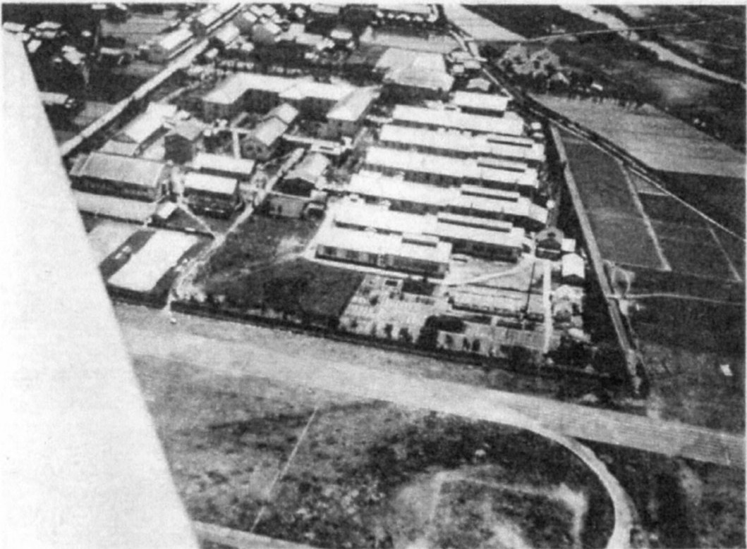 説明文に「富山市外奥田村 明治廿六年七月薬学研究の目的を以て富山市の売薬者相謀つて、市内梅沢町に共立薬学校を設立した、仝三十年市営となり、市立薬学校と改め、仝四十年県立に移り富山県薬学校と改称、専門学校令の組織に改め仝四十三年四月に至り県立薬学専門学校と改称せられ、大正十年四月に至り官立に昇格し今の地に移つたのである。本校は現在二万五千余坪の敷地と、二千坪の建坪を有す」とあり